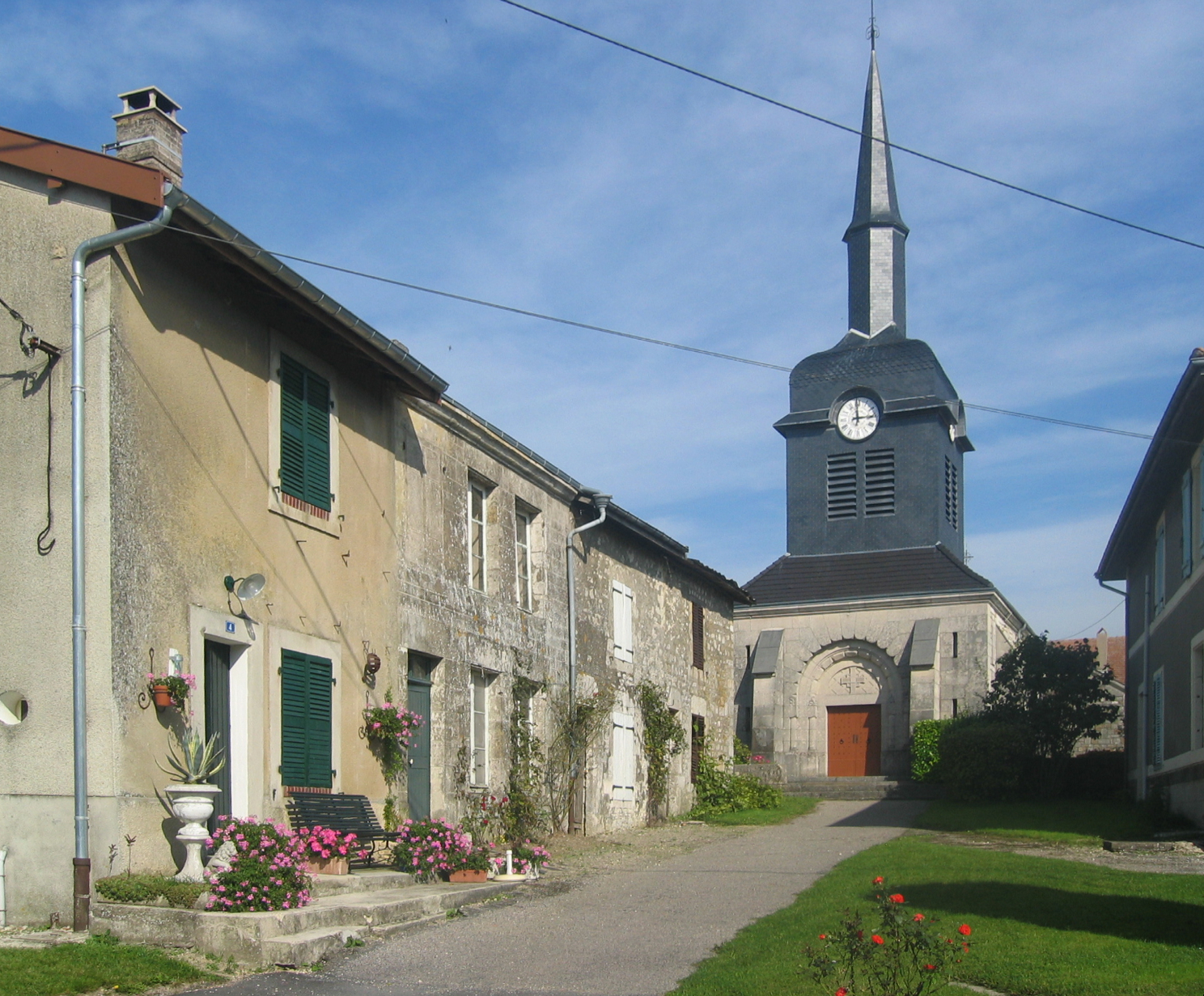 Eglise d'Aincreville